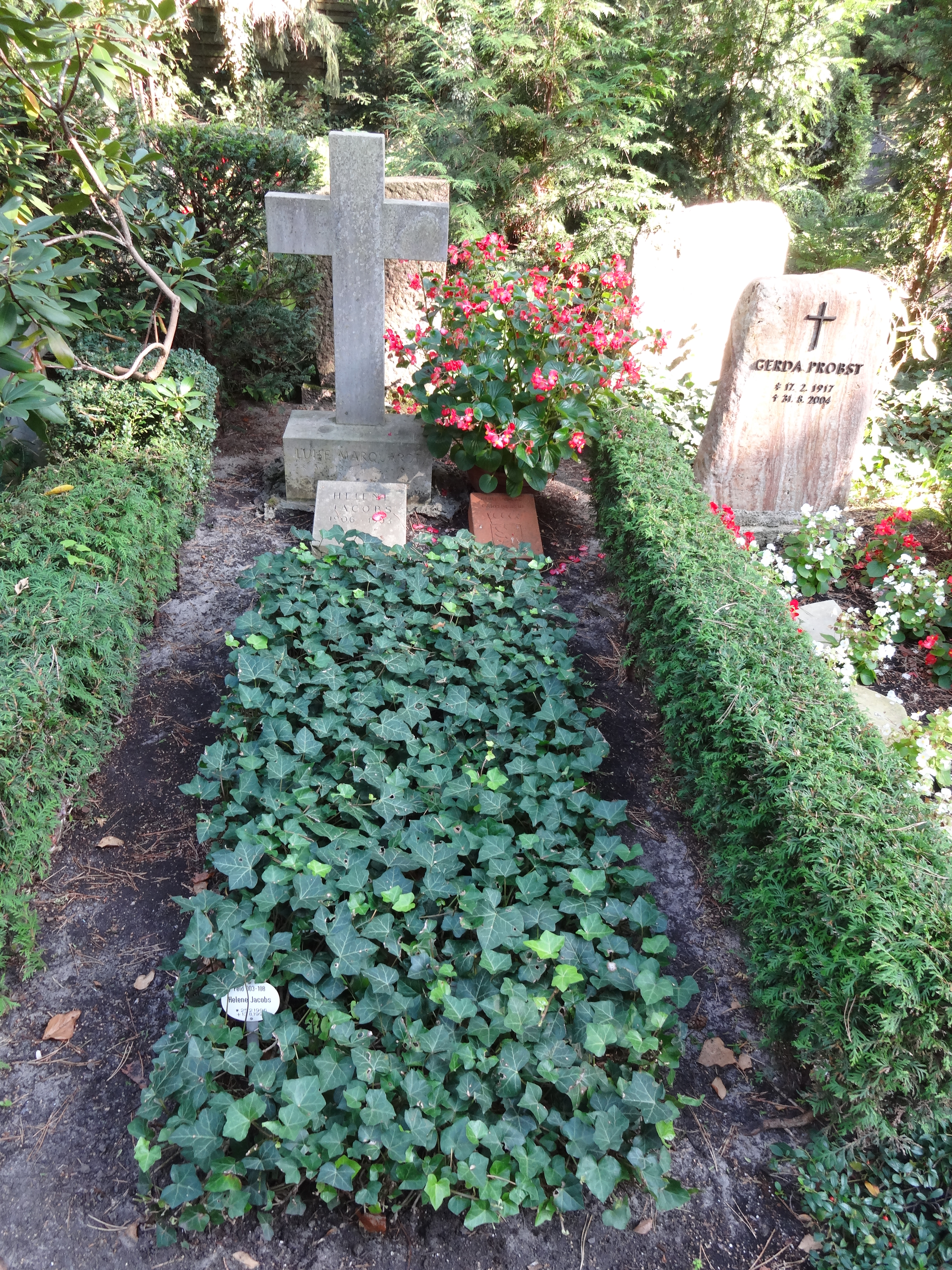 Ehrengrab für Jacobs, Helene auf dem Waldfriedhof Dahlem; der Friedhof ist ein Gartendenkmal in BerlinThis is a photograph of an architectural monument.